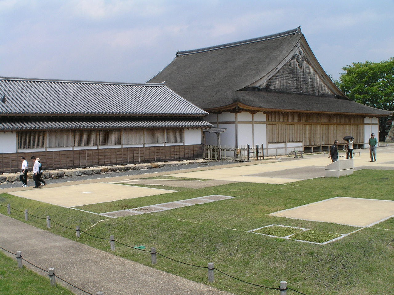 篠山城大書院